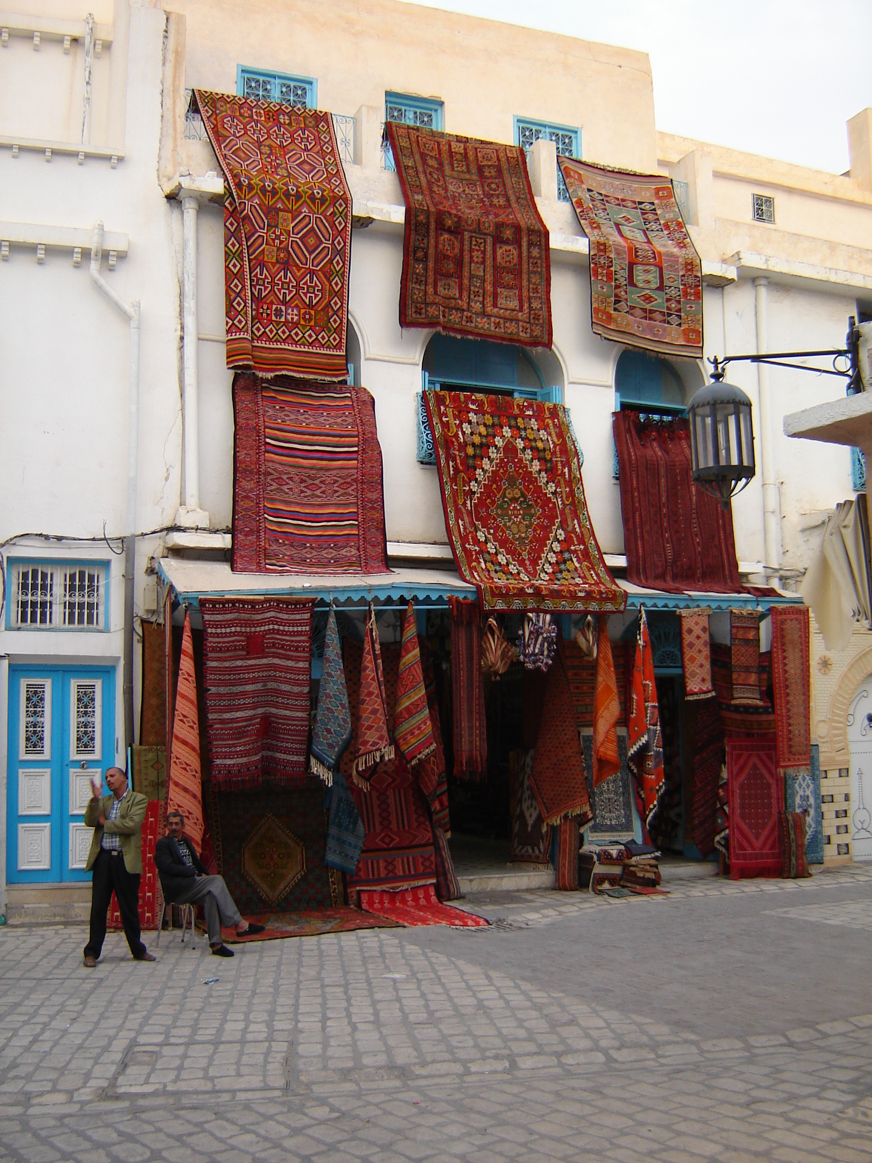 Kairouan